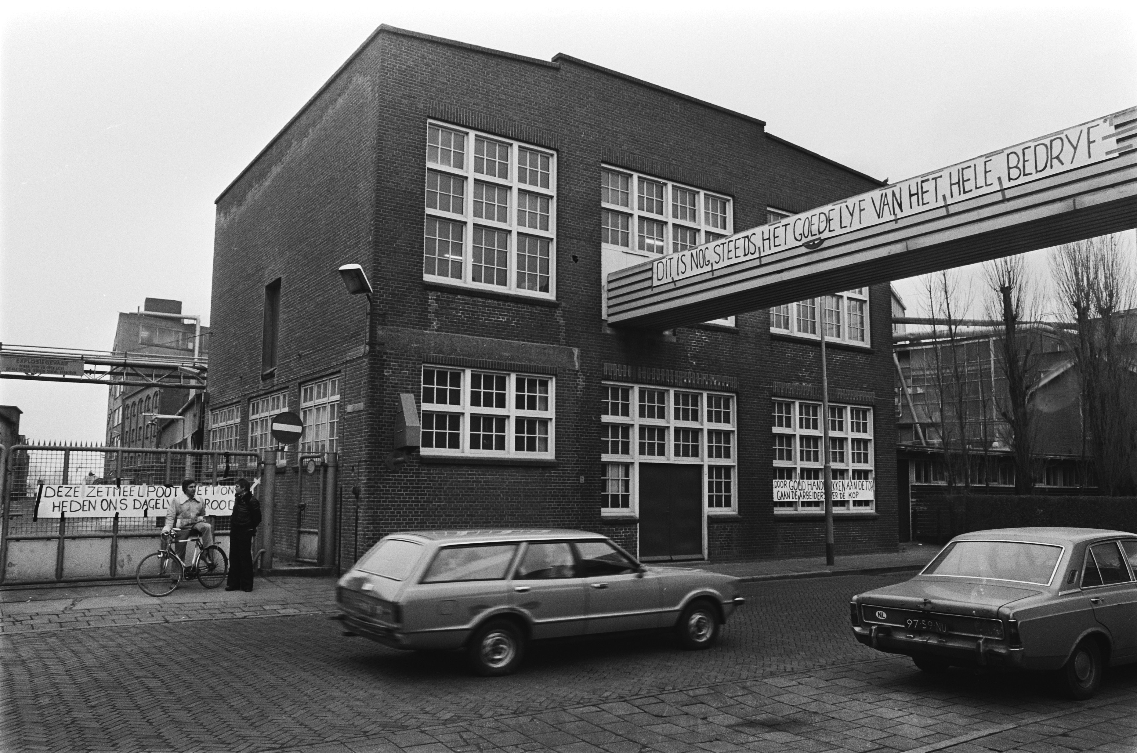 Collectie / Archief : Fotocollectie Anefo Reportage / Serie : [ onbekend ] Beschrijving : Bedrijf KSH in Koog aan de Zaan door werknemers bezet; bezette KSH-vestiging met spandoeken Datum : 4 maart 1978 Locatie : Koog aan de Zaan, Noord-Holland, Zaanstad Trefwoorden : SPANDOEKEN, WERKNEMERS, bedrijven, bezetting Instellingsnaam : KSH Fotograaf : Croes, Rob C. / Anefo Auteursrechthebbende : Nationaal Archief Materiaalsoort : Negatief (zwart/wit) Nummer archiefinventaris : bekijk toegang 2.24.01.05 Bestanddeelnummer : 929-6039